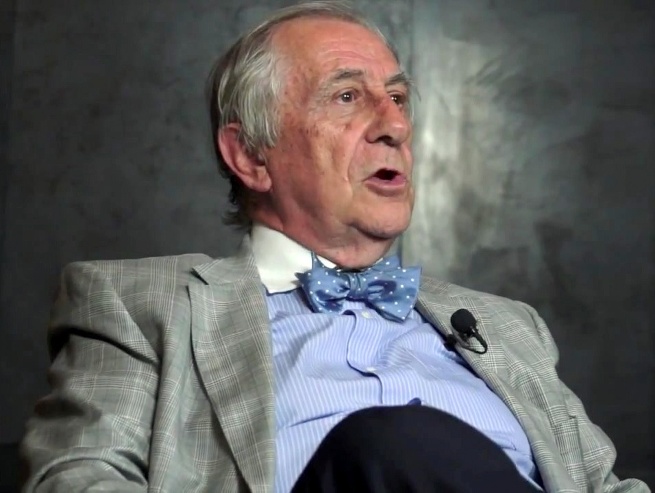 Entrevista a Inocencio Arias en lacaffe video magazine